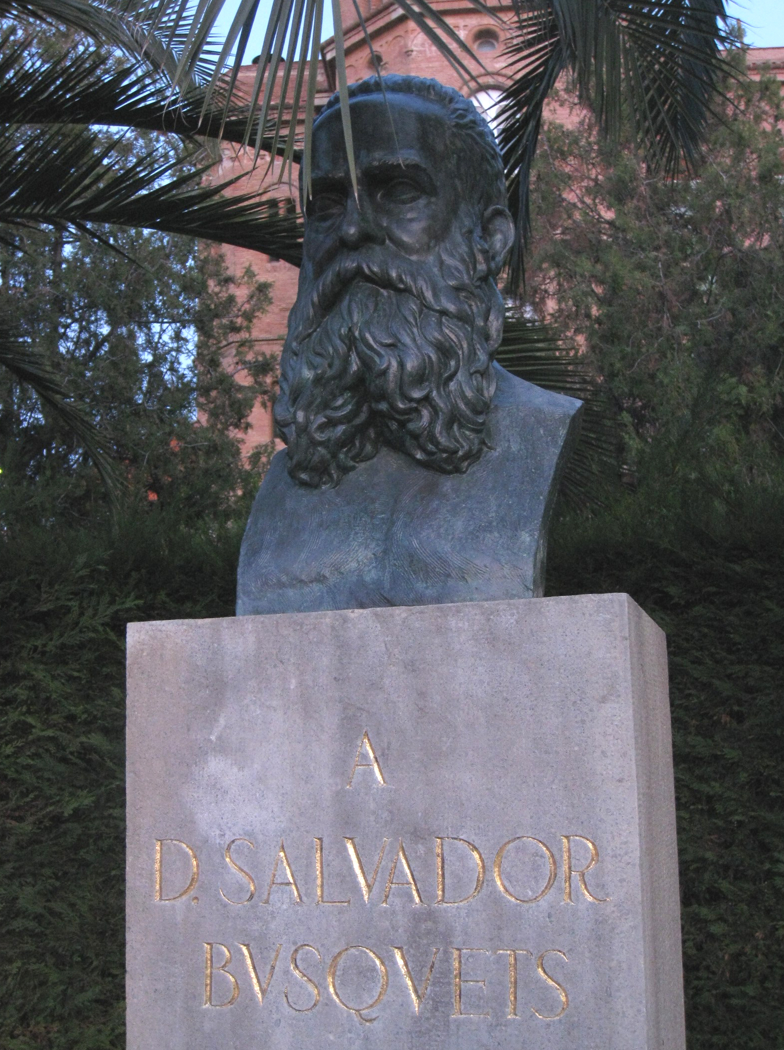 Bust de Salvador Busquets, Fundació Busquets (Terrassa)